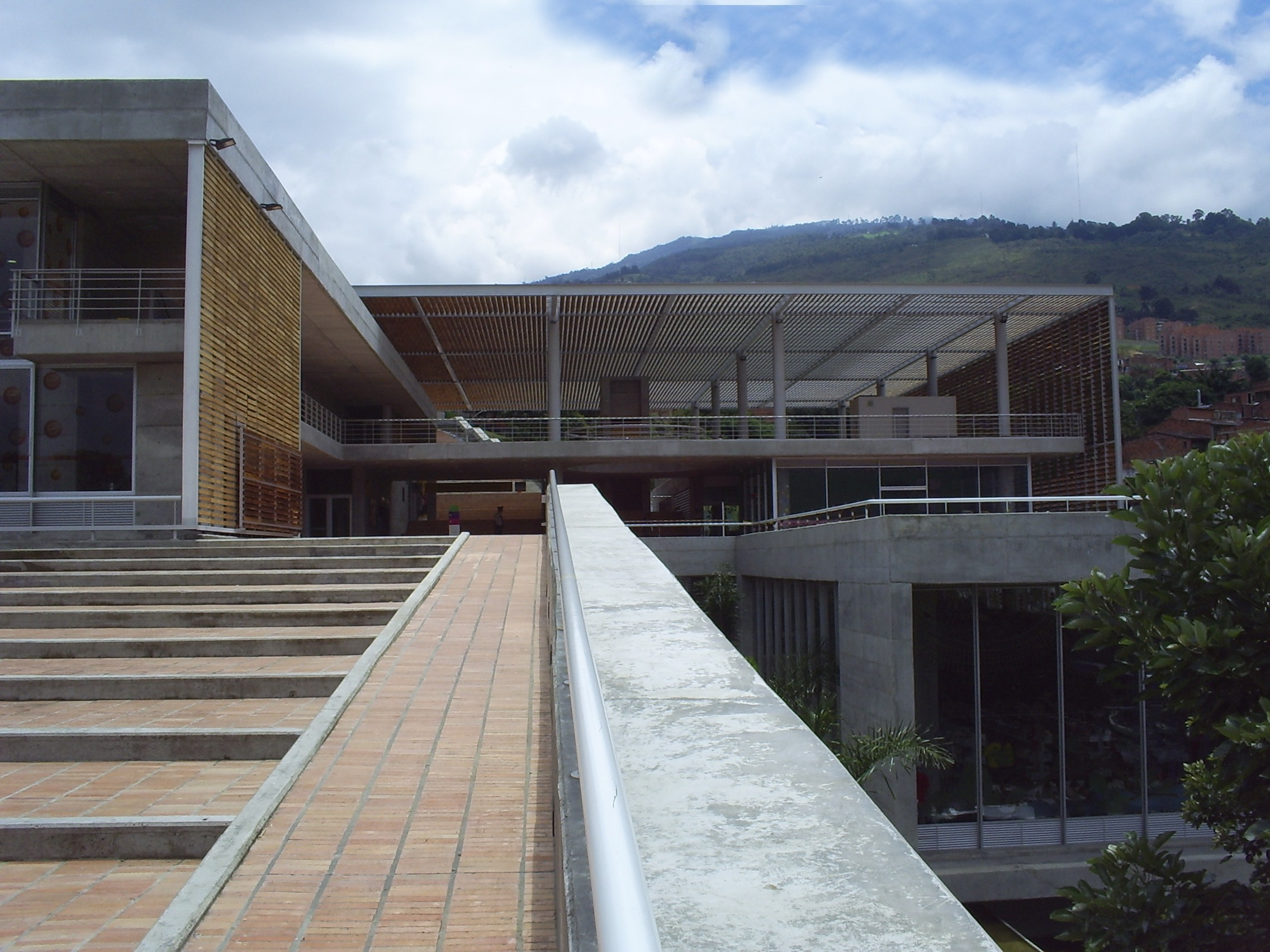 Biblioteca Tomás Carrasquilla, Medellín, Colombia